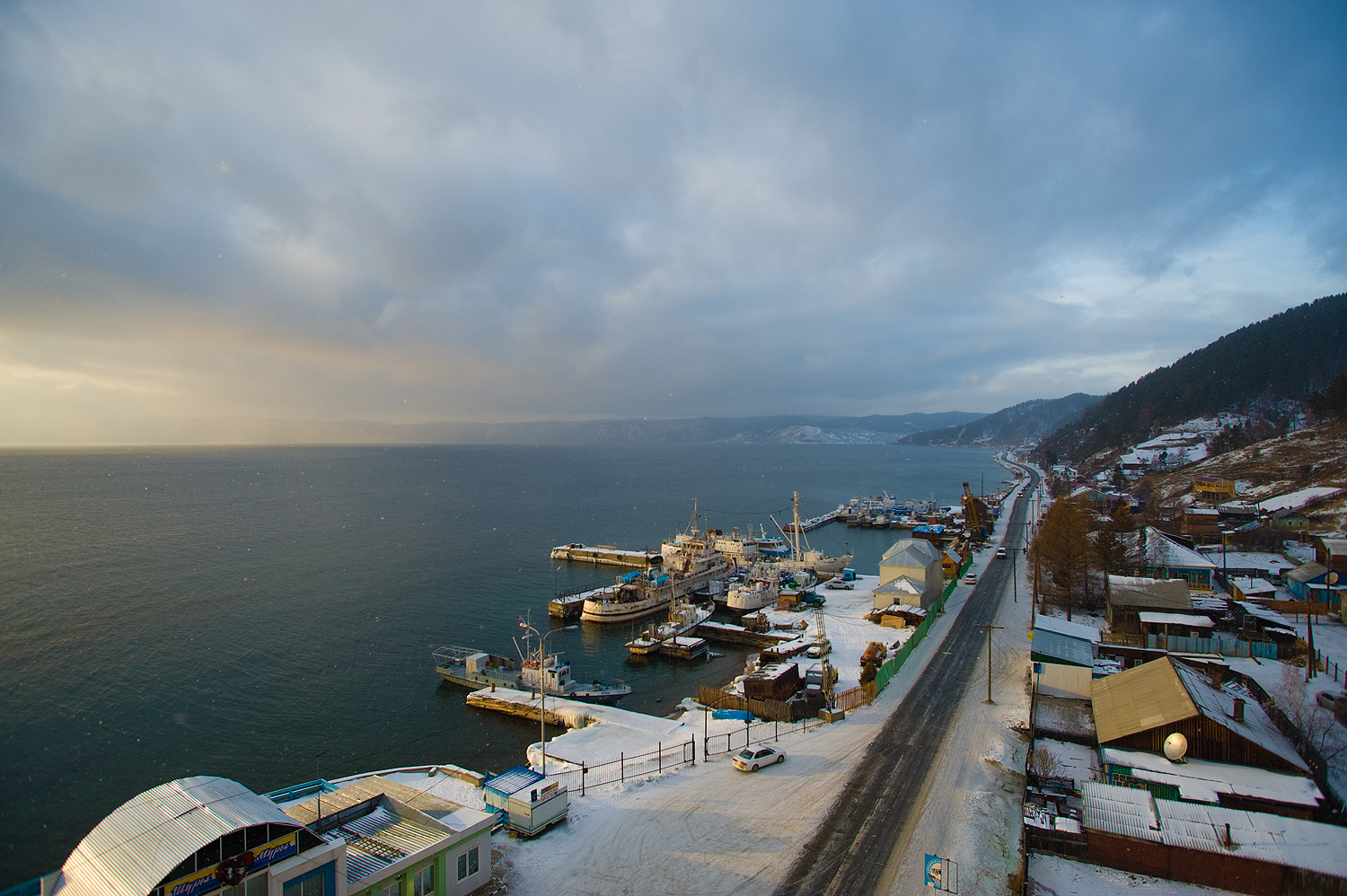 Вид на Листвянку в декабре 2008 года